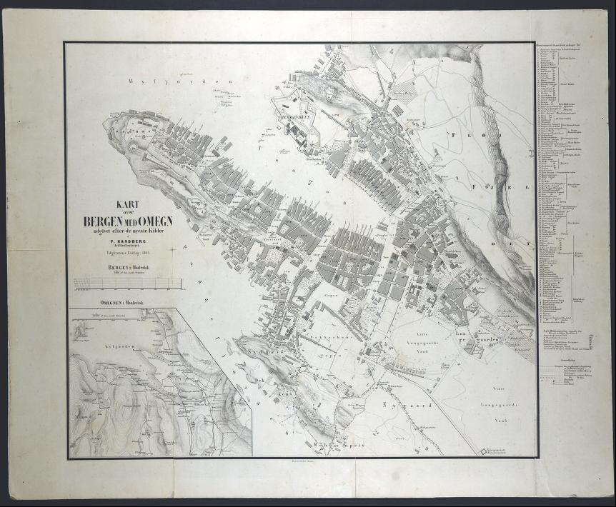 Bergen en 1864. Image ancienne.